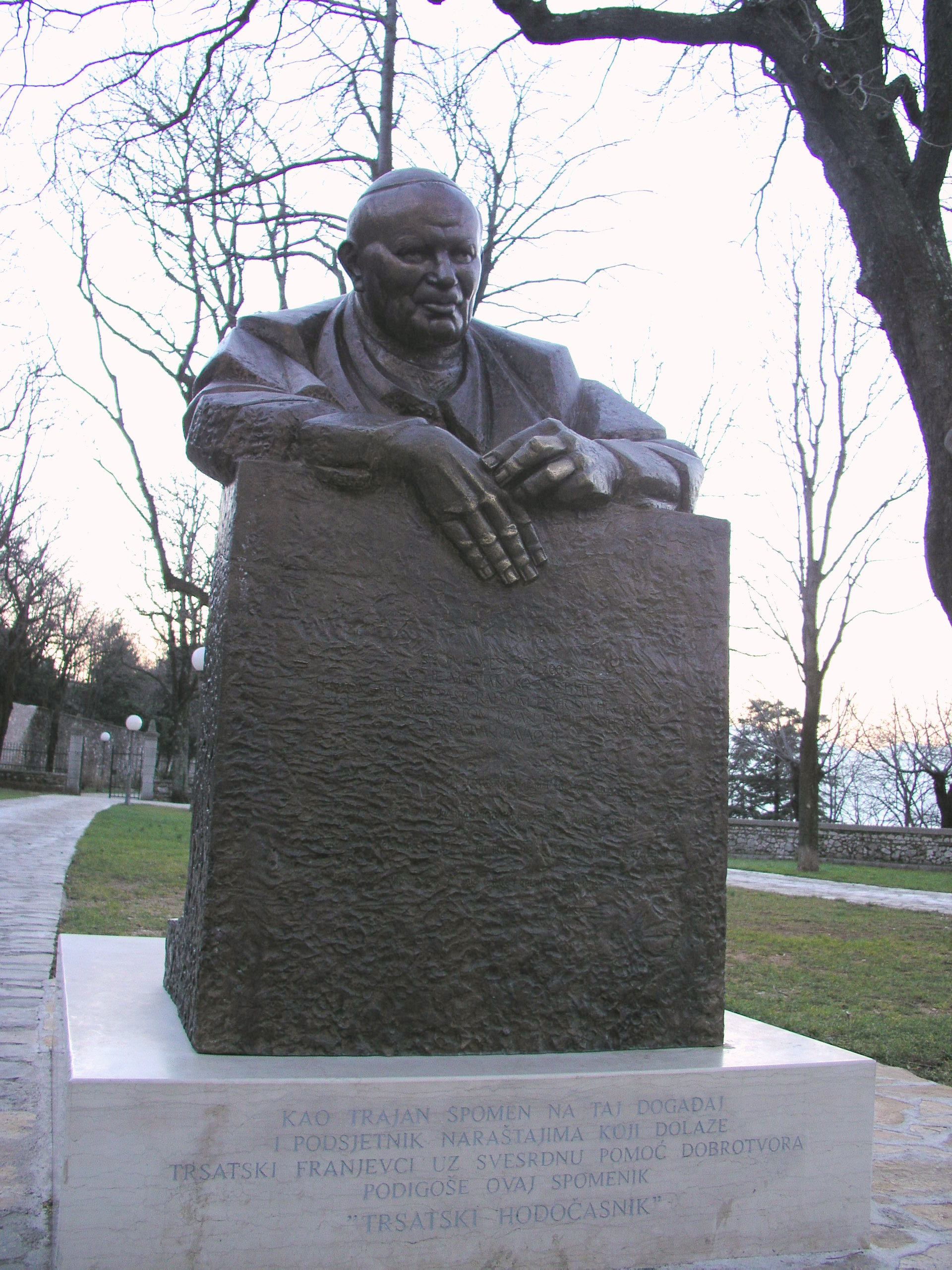 Trsatski hodočasnik